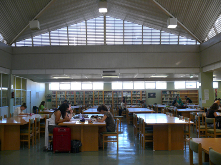 Biblioteca de la Facultad de Veterinaria (Universidad de Zaragoza)